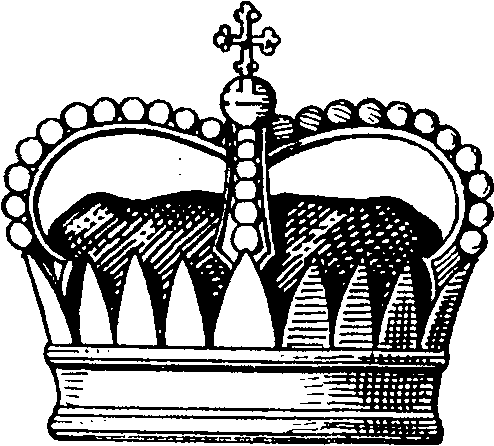 "Hierher gehört endlich noch die Krone des kleinen italienischen Freistaates San Marino (Fig. 38). Es ist eine Zackenkrone (Davidskrone) mit vier Bügeln und einer niederen Purpurmütze."